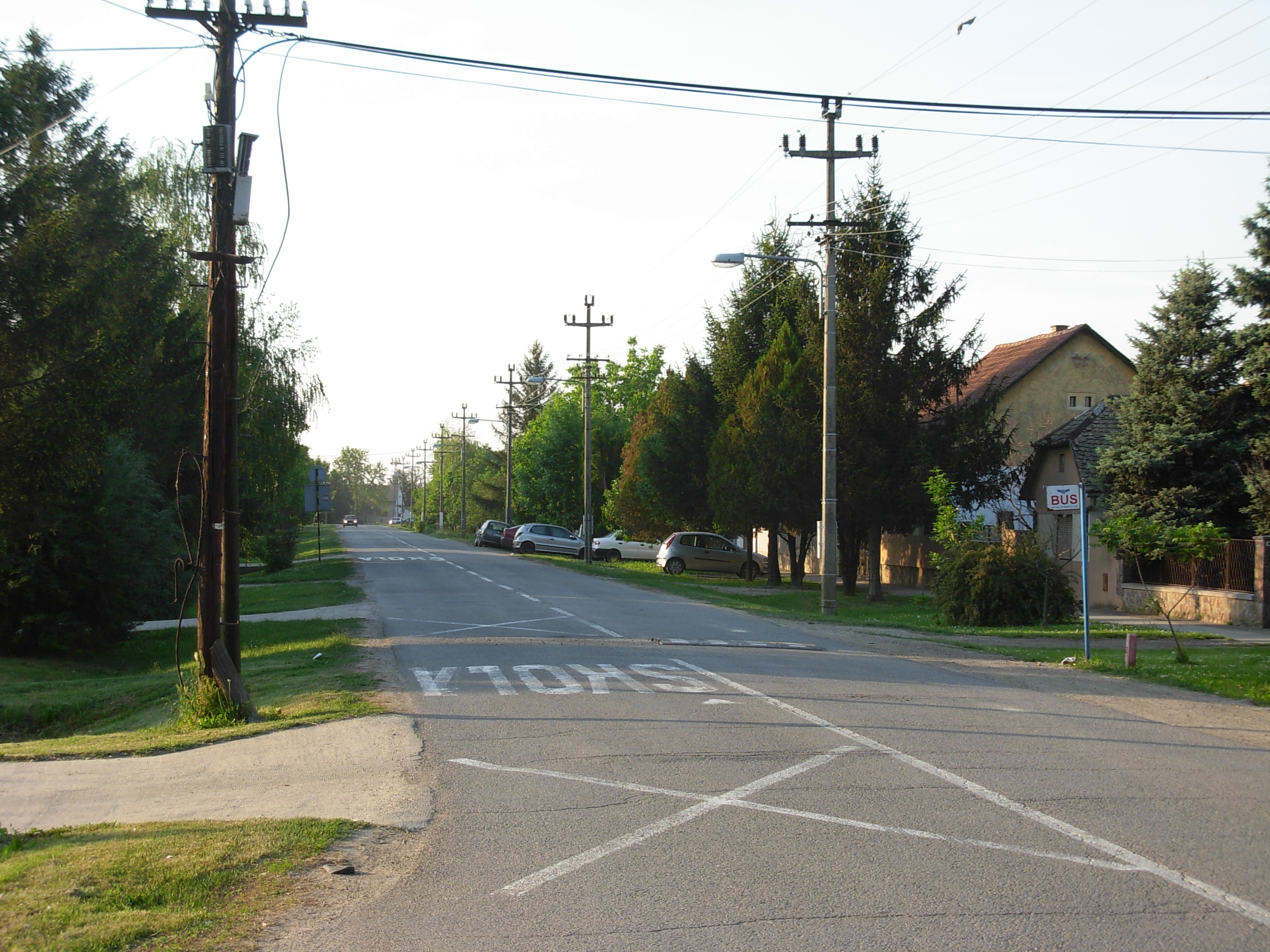 Ulica Kralja Petra I u Begeču.